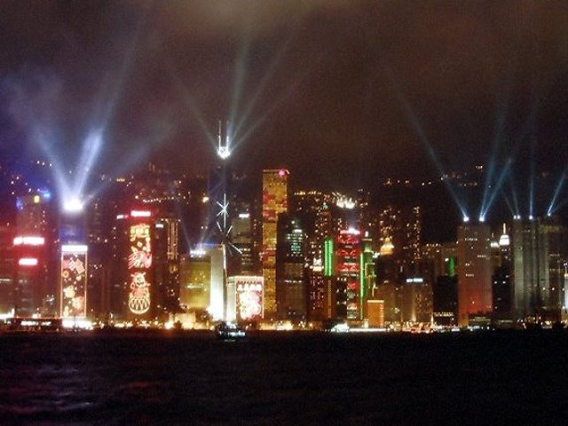 幻彩詠香江，自己拍攝